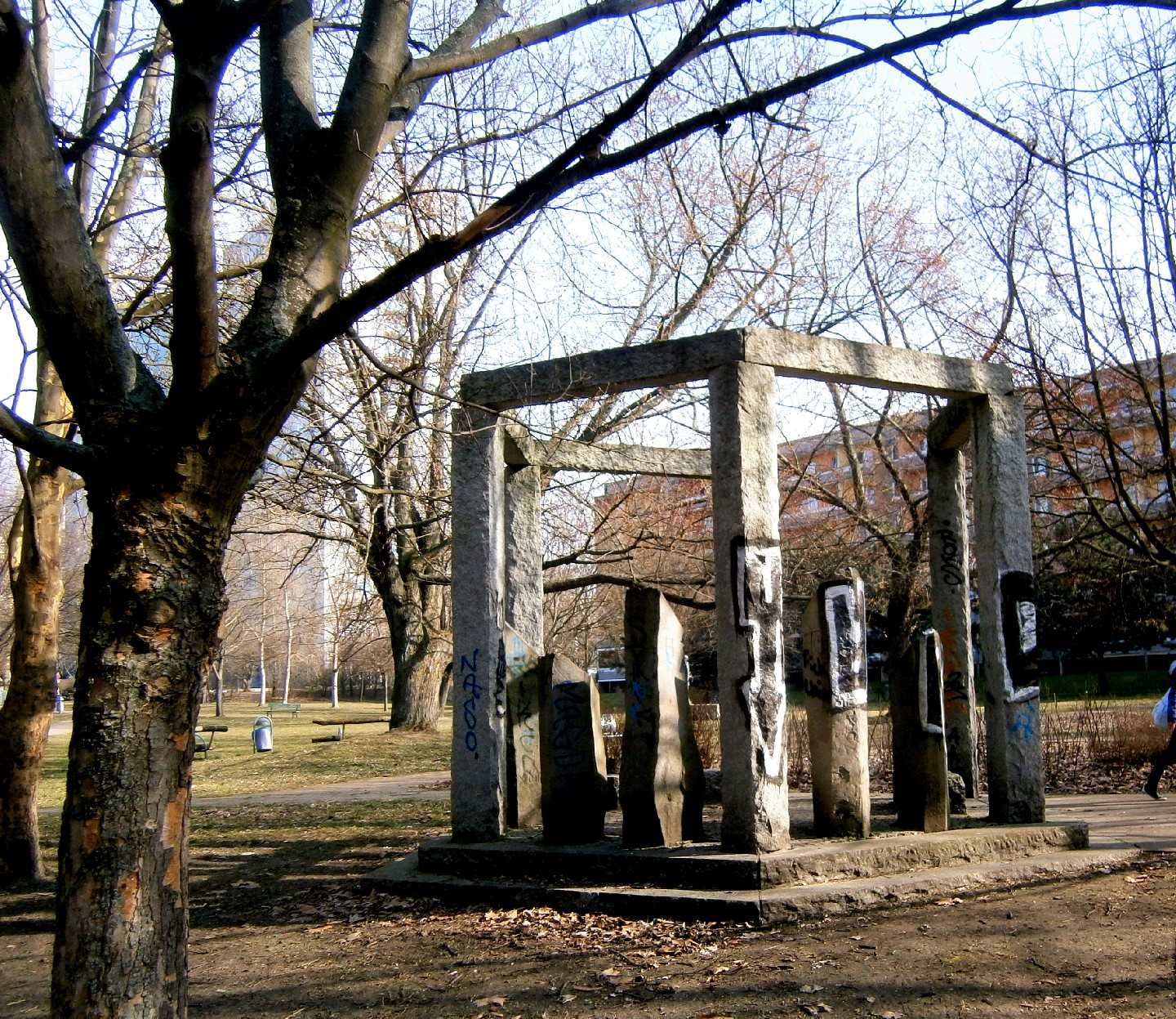 Der Einsteinpark ist ein Park im Norden von Berlin-Prenzlauer Berg. Hier der Einsteinpavillon.